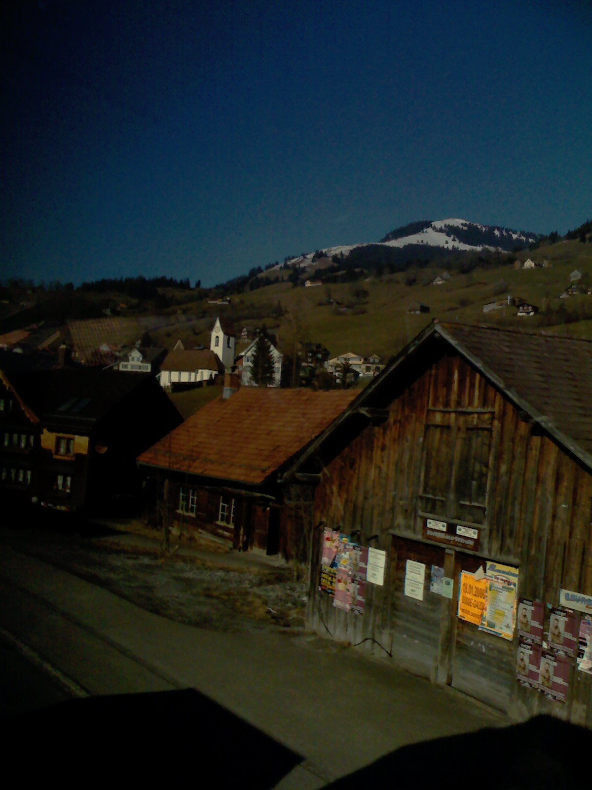 Stein St. Gall with church - Stein Sant-Galo kun preĝejo